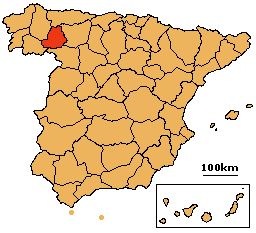 Modificación del mapa "Map_Spain_1822_.png" con colores iguales para todas las provincias y provincia de Vierzo resaltada.